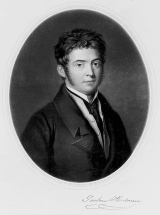 Josua Heilmann (1796-1848), Erfinder von Textilmaschinen